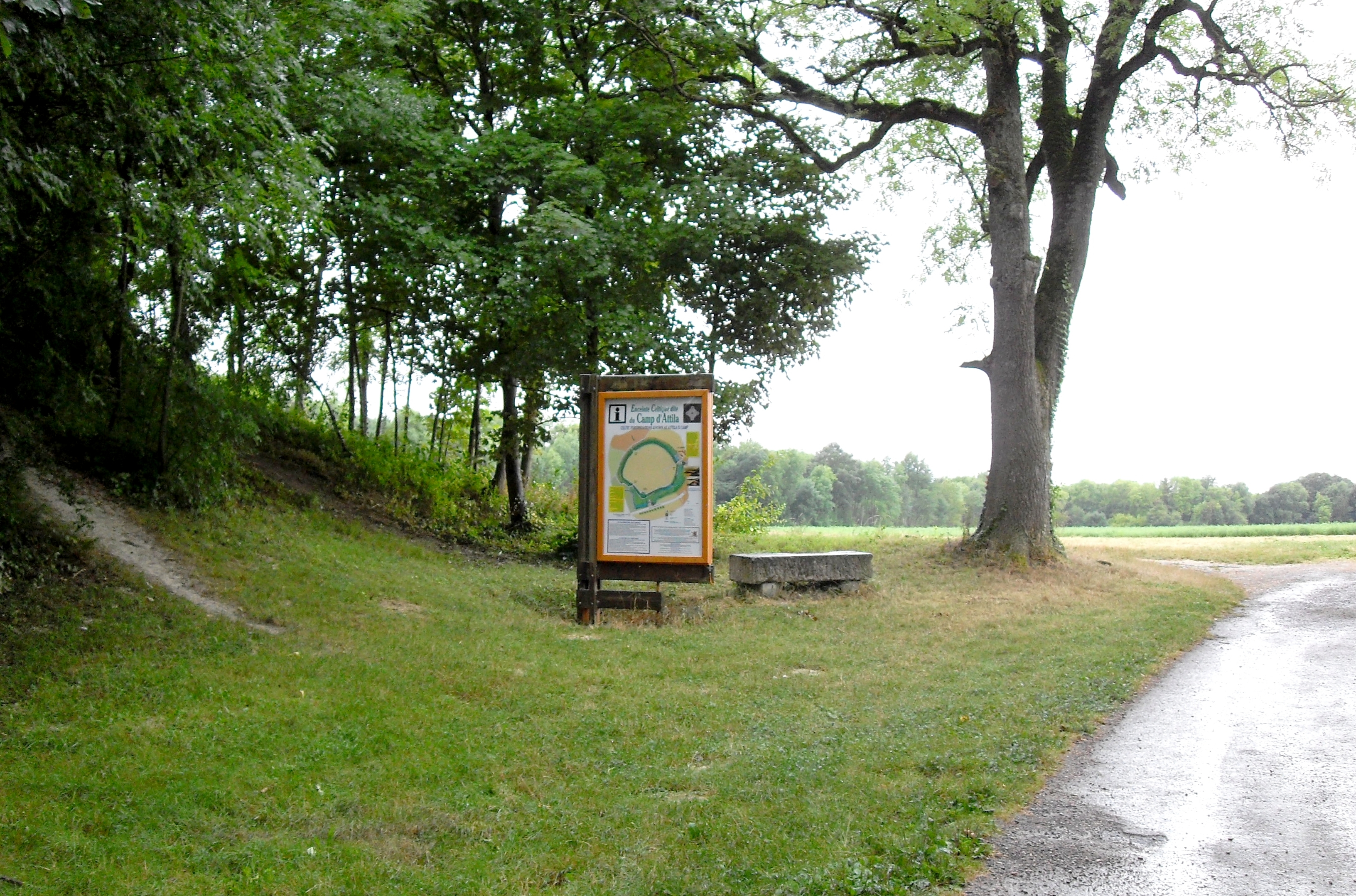 La Cheppe Camp d'Attila - l'entrée située à l'est, du côté du village de La Cheppe